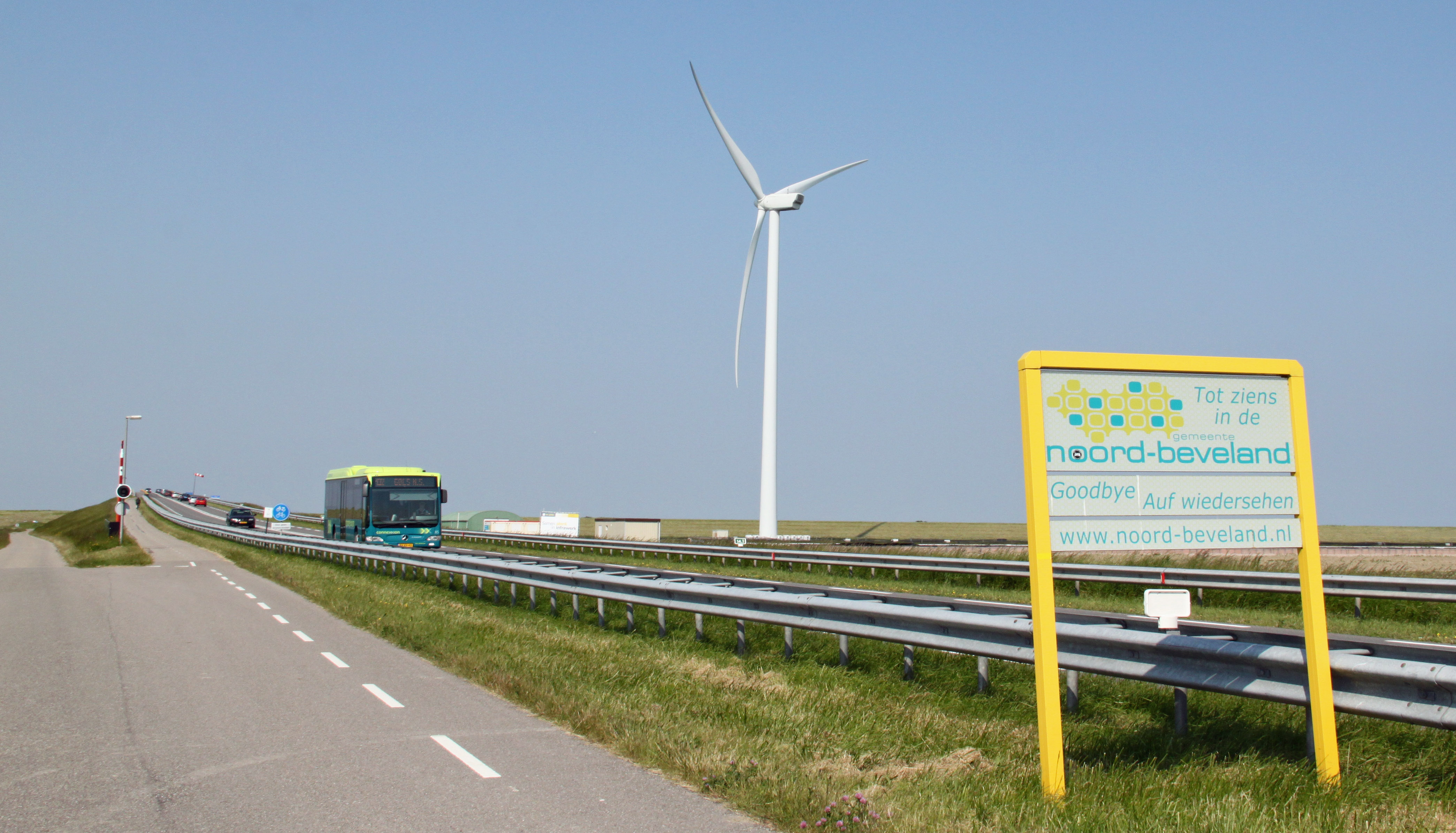 Een bus van Van Oeveren op buslijn 132 bij de Zeelandbrug bij Colijnsplaat in Noord-Beveland.